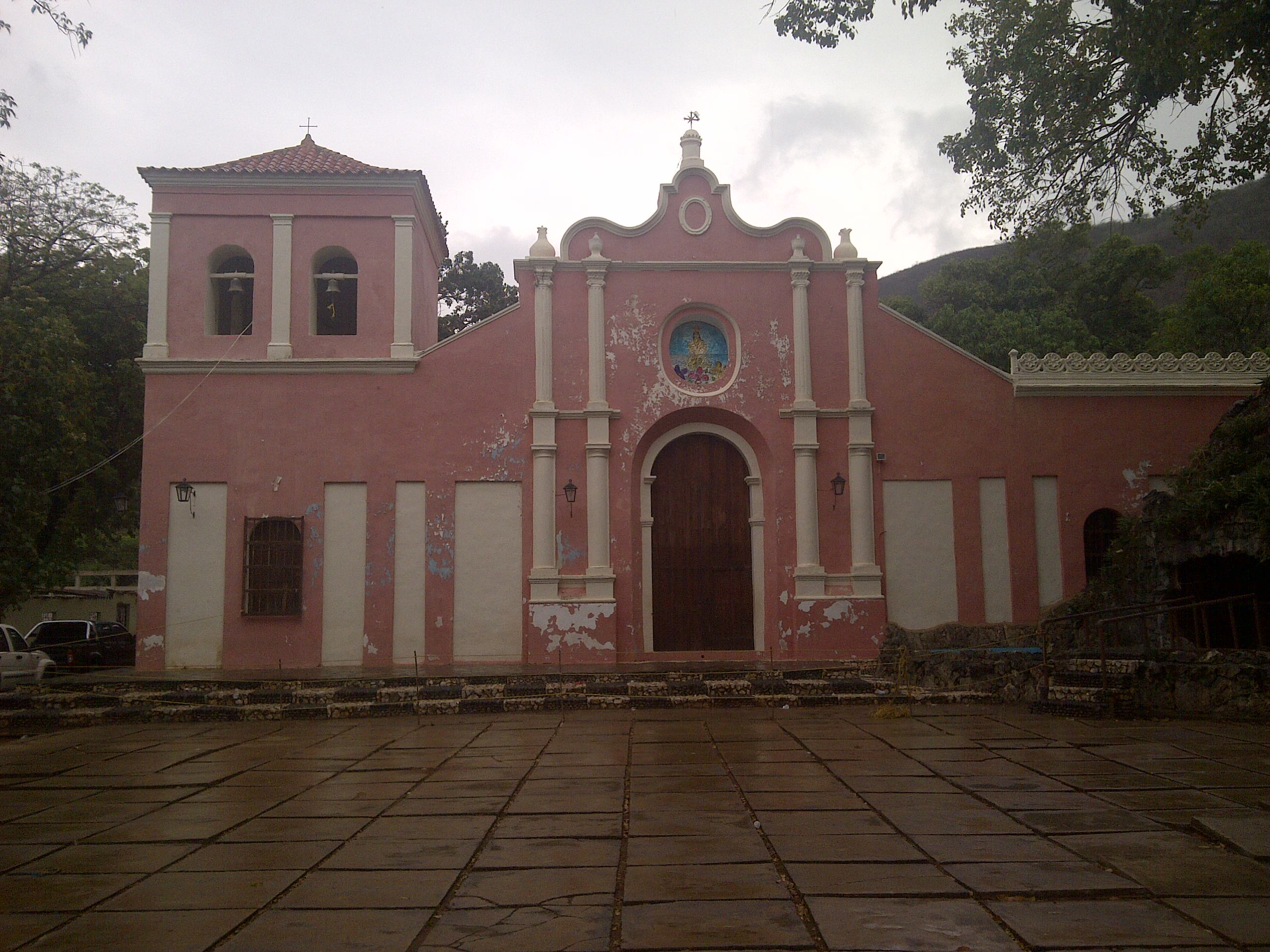 Iglesia de Curarigua